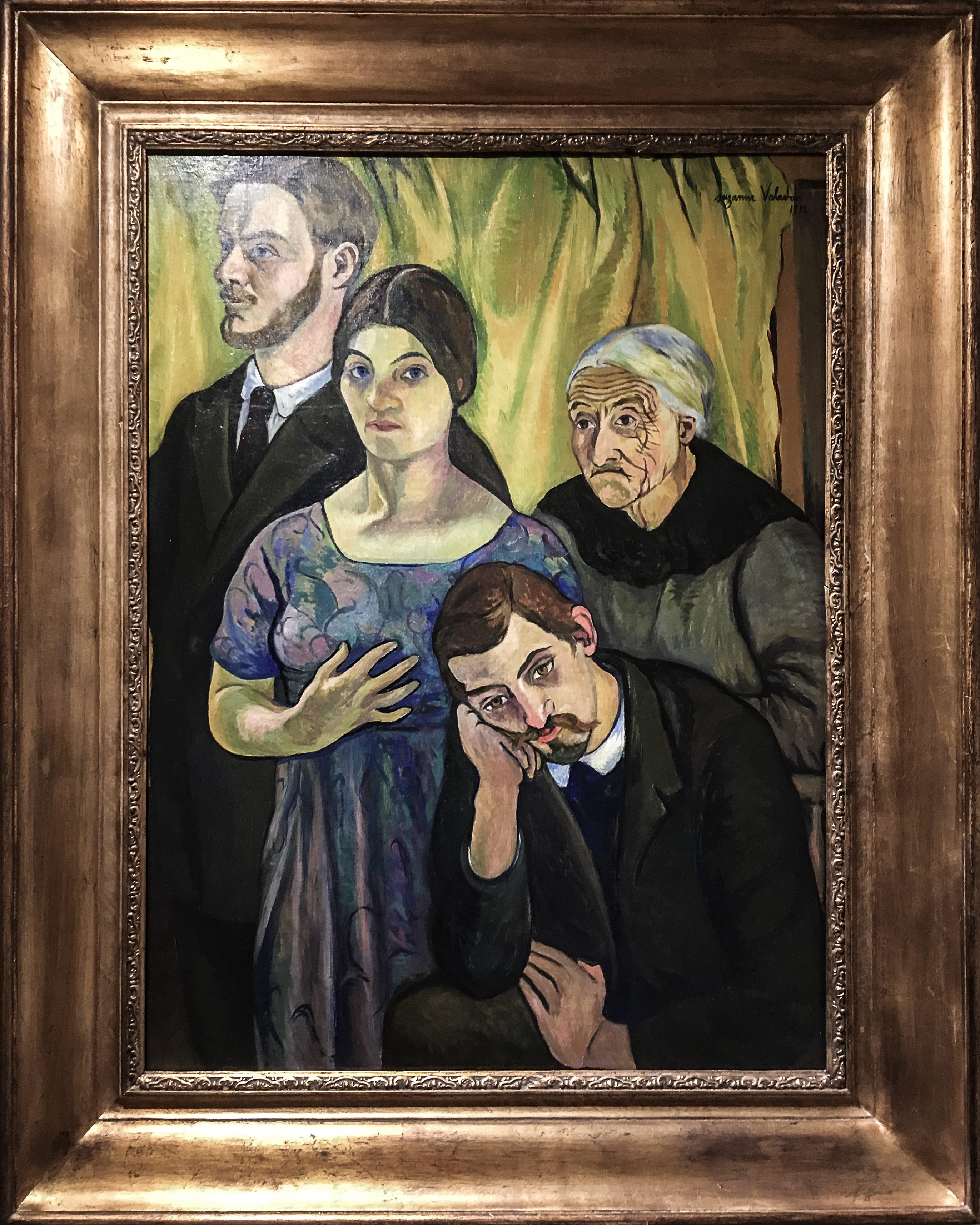 Musée de Montmartre à Paris Suzanne Valadon, Maurice Utrillo, André Utter : 12, rue Cortot exhibition, 16 October 2015 - 15 February 2016, Musée de Montmartre, Paris.